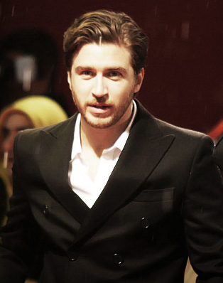 Actor Alessandro Roja - Romanzo Criminale - Red Carpet